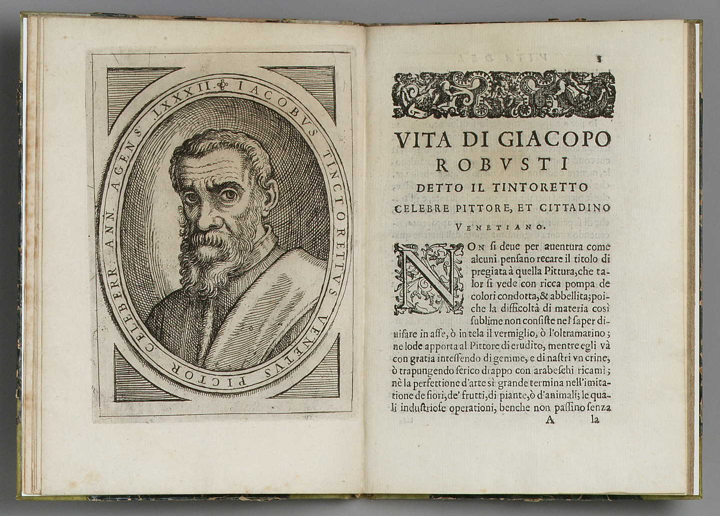 Venice: Oddoni, 1642